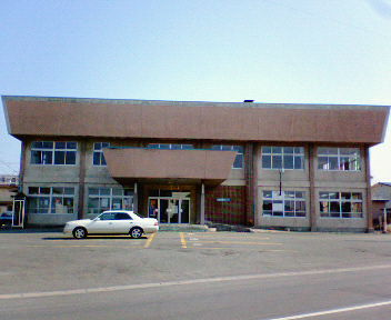 五戸町にある、南部バス旧本社（1996年まで本社として使われ、現在では同社の総合管理センターとして使われている。）